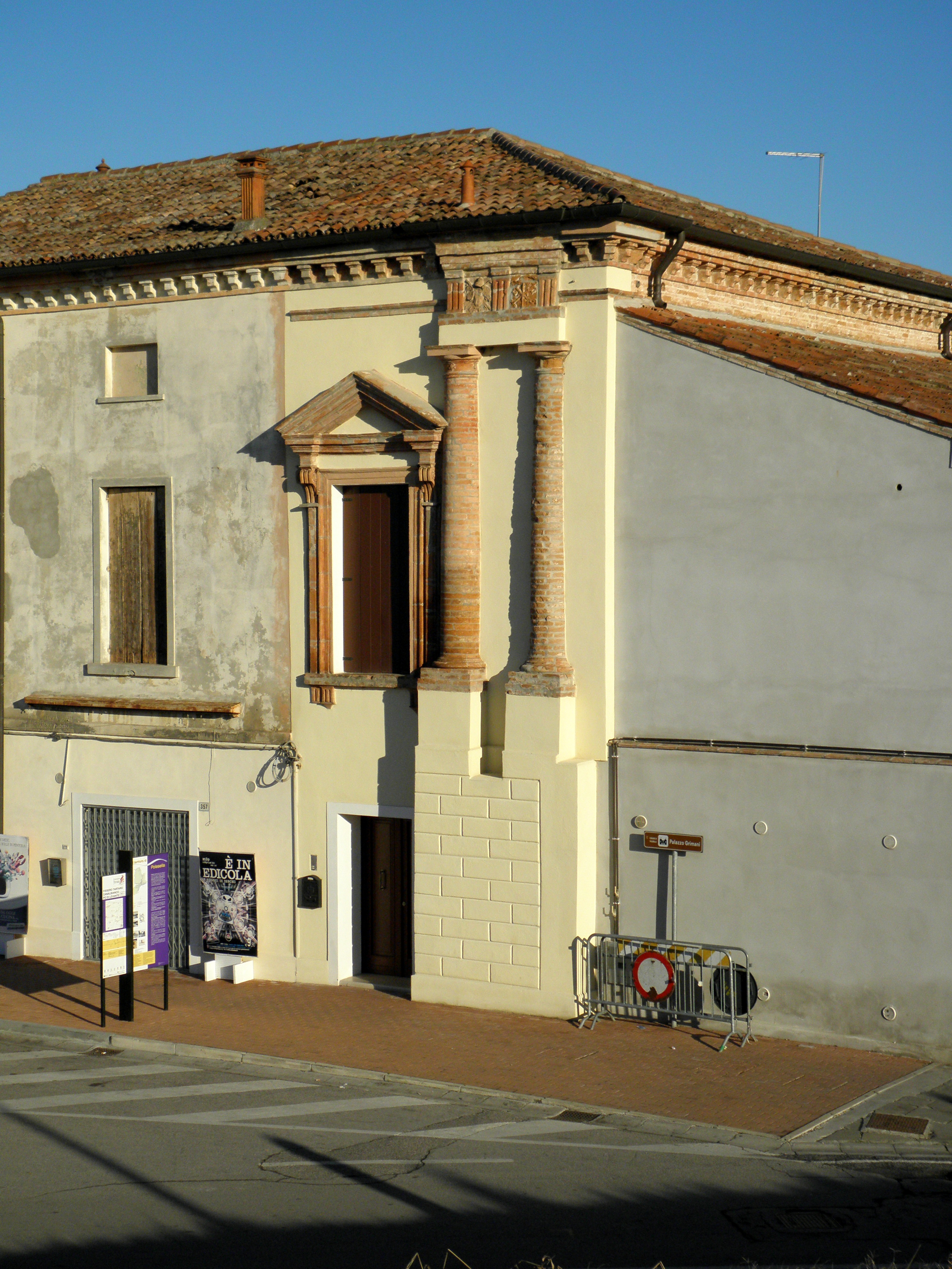 Polesella, Palazzo Grimani. particolare architettonico inglobato in strutture più recenti.